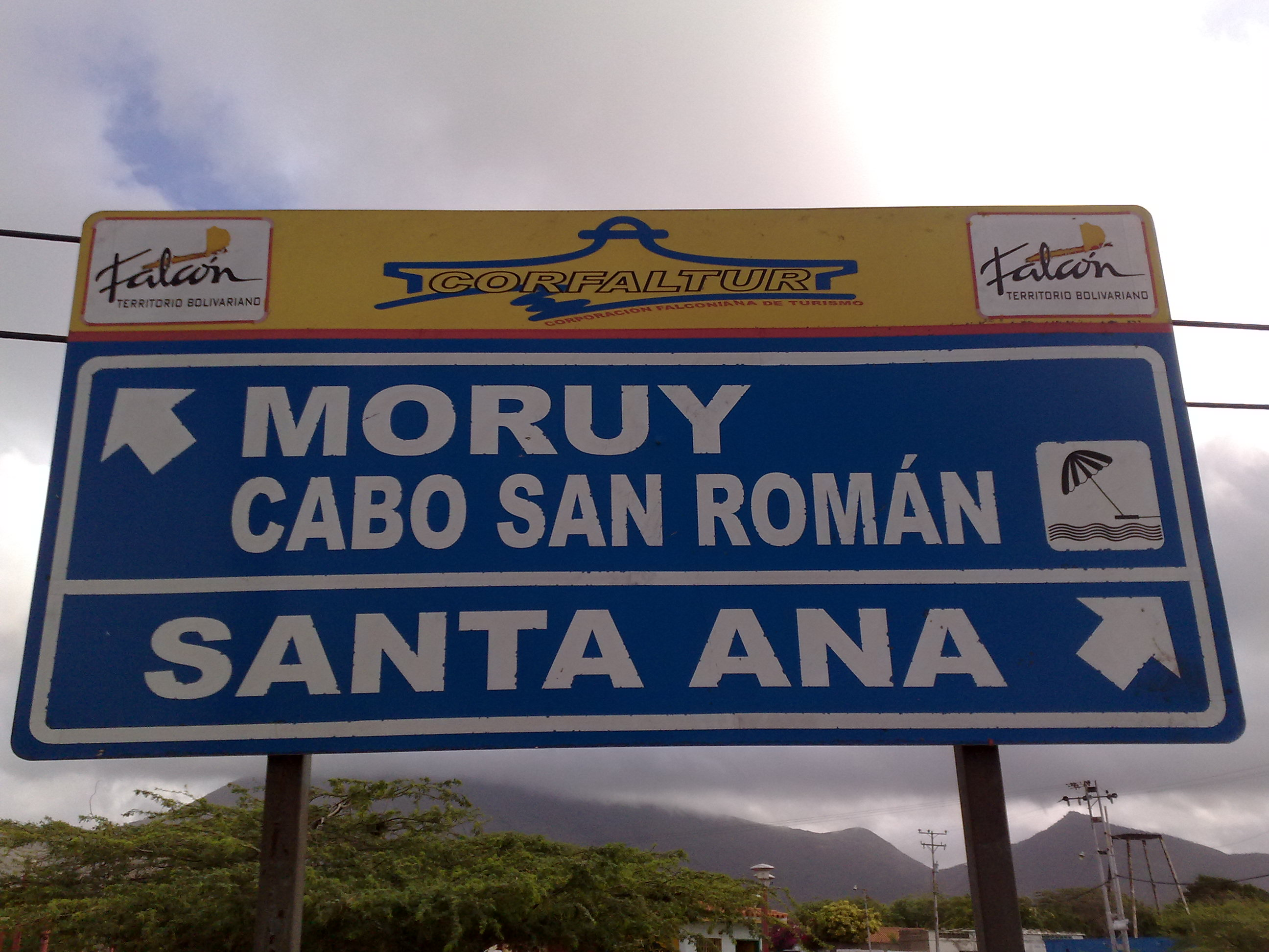 Señal de tráfico en la plaza Alí Primera de Santa Ana de Paraguaná, indicando las vías hacía Moruy, Santa Ana y el Cabo San Román.